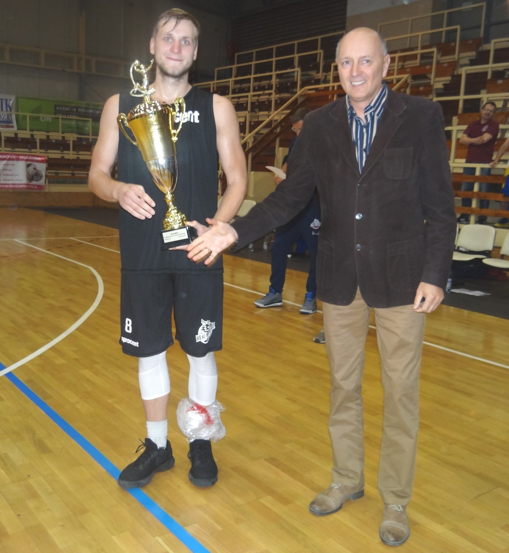 MVP memoriału Romana Wysockiego (23.09.2018)